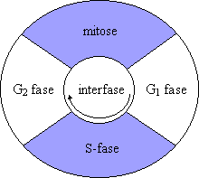 Beschrijving van de cyclus die een plantaardige of dierlijke cel doormaakt.